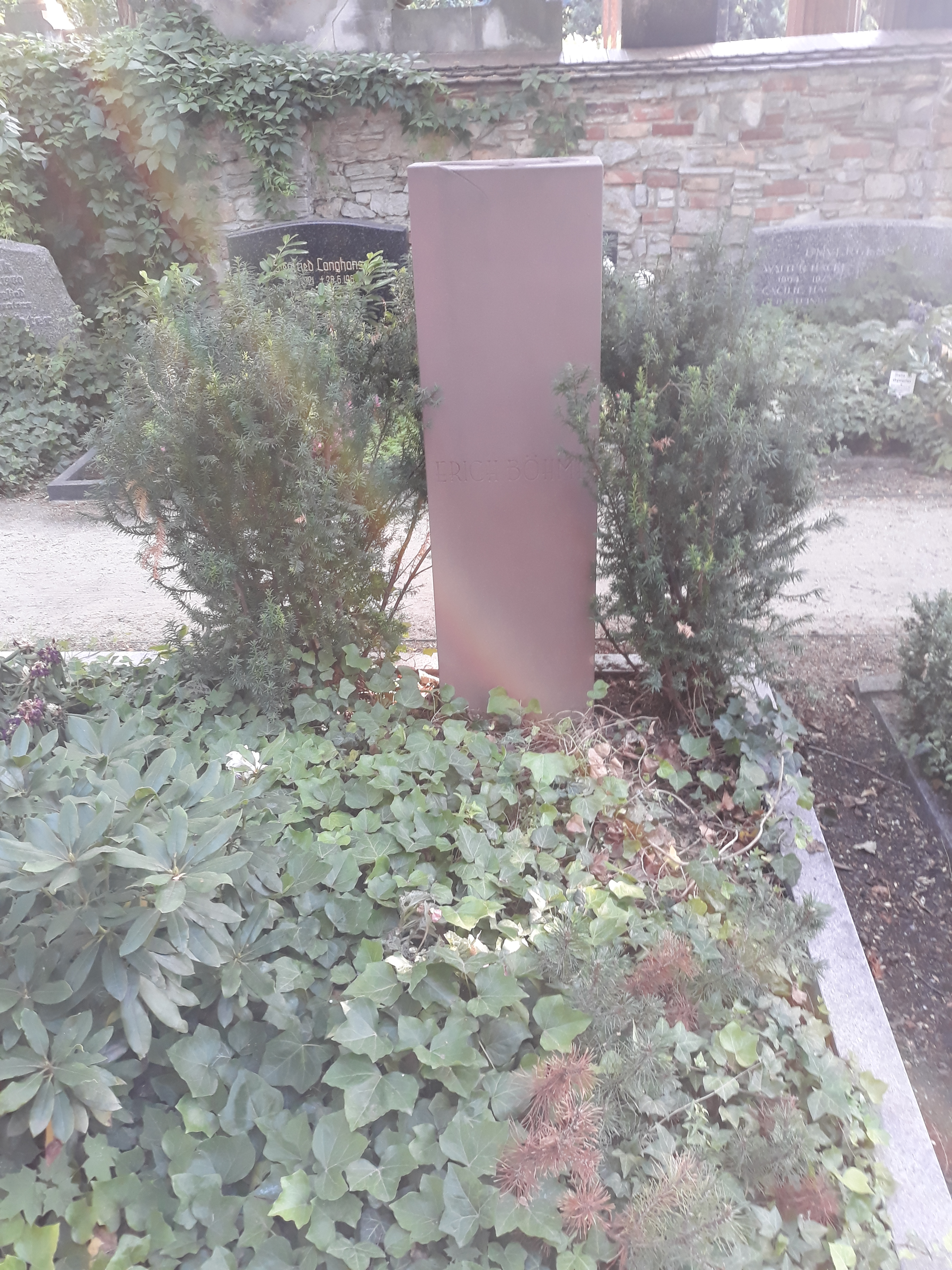 Das Grab des deutschen Journalisten Erich Böhme, Friedhof der Französischen Gemeinde I, Berlin.